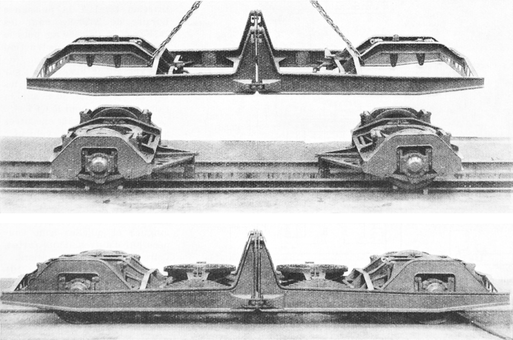 Mitteldrehgestell des Blauen Pfeils BCFZe 4/6 der BLS-Gruppe, oben mit abgehobenen Drehgestellrahmen, unten zusammengebaut